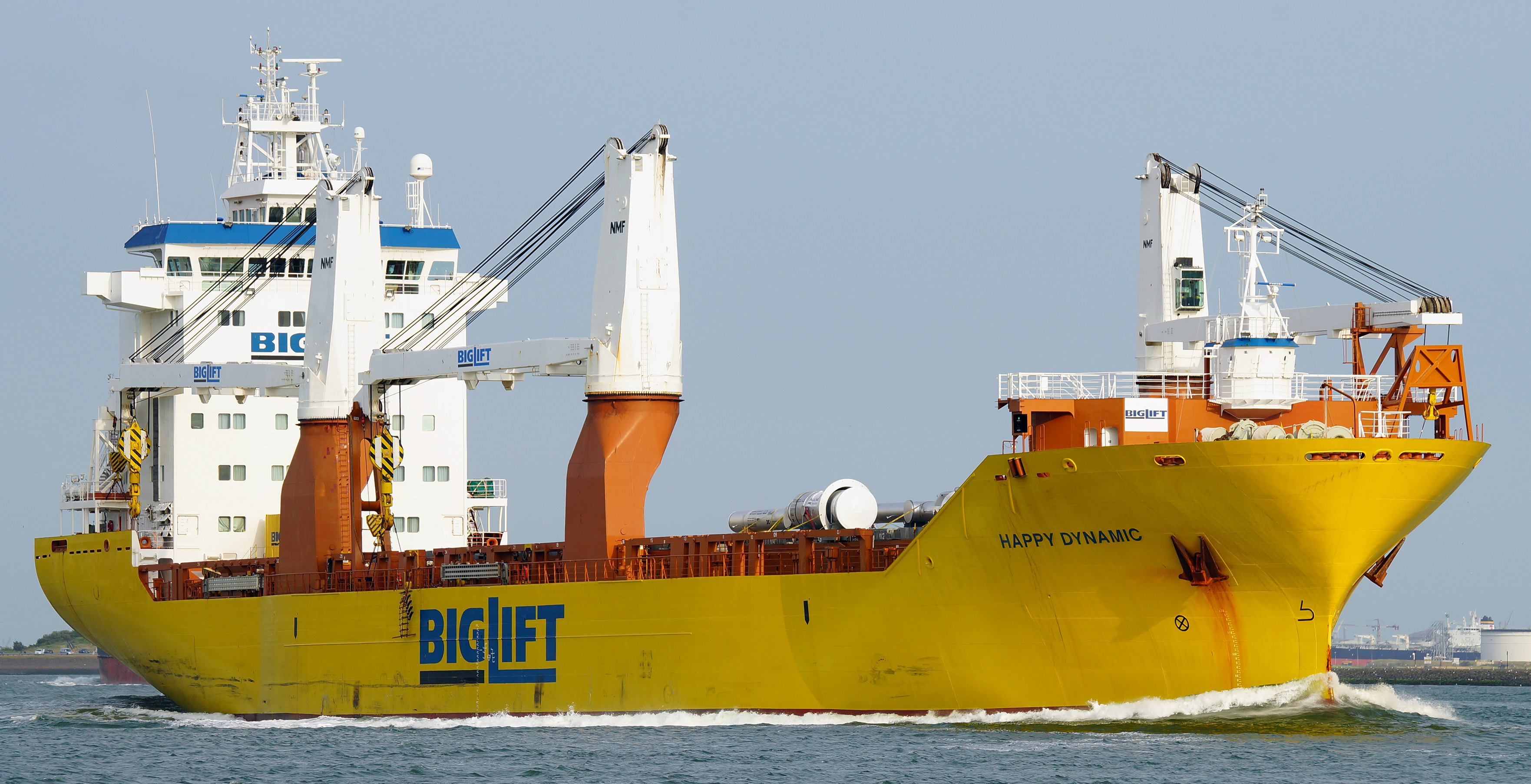 Nieuwe Waterweg 4-7-2015 . Bestemming St Petersburg.